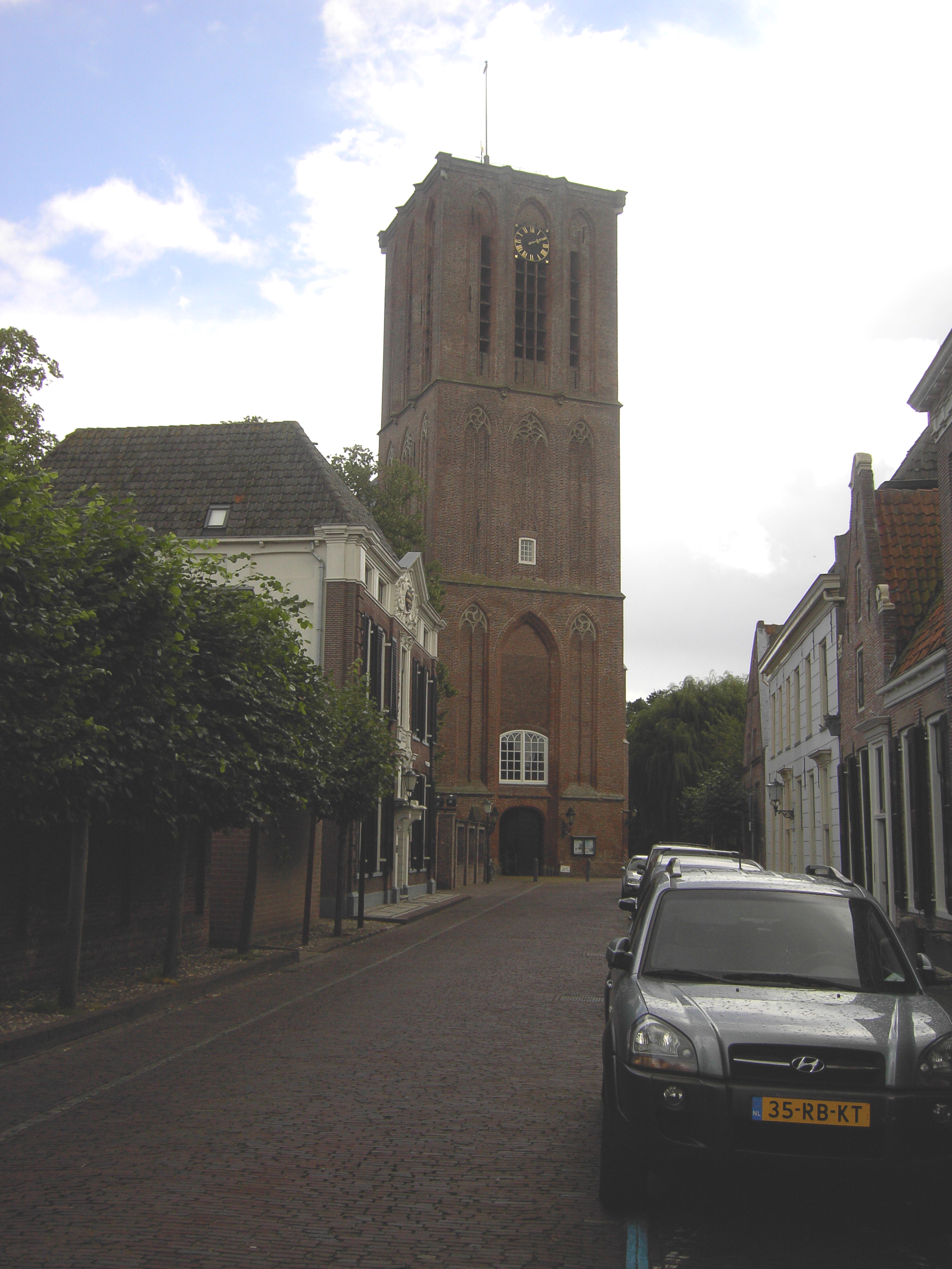 Kerktoren - Sint-Nicolaaskerk - Elburg - Gelderland - Nederland.